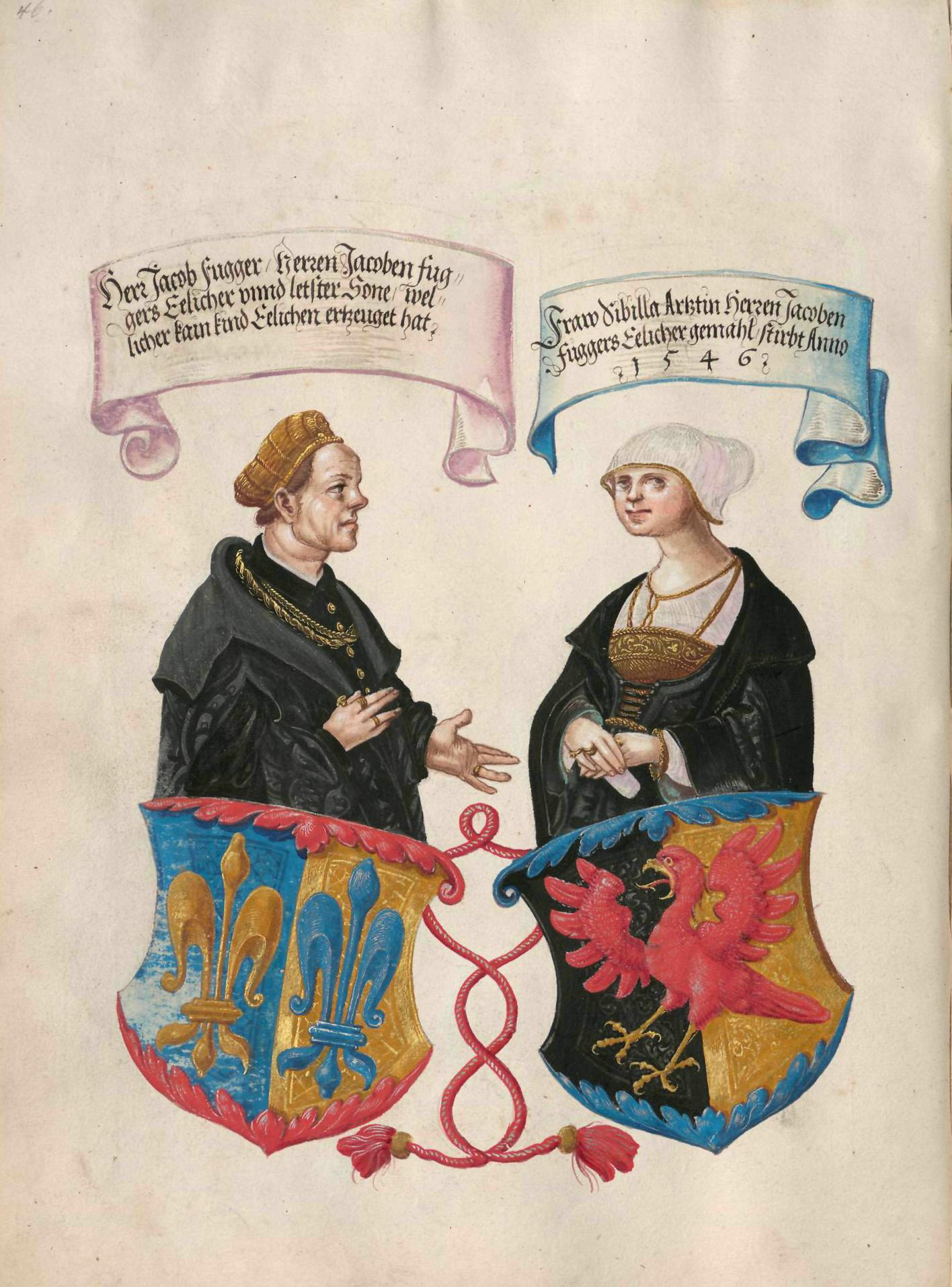 Geheimes Ehrenbuch der Fugger, hergestellt in der Werkstatt Jörg Breu d. J., 1545–1549 Portrait- und Wappendarstellung